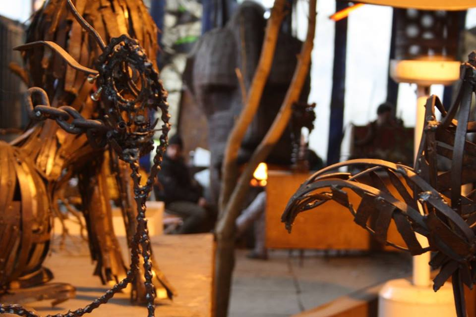 Atelier de sculptures en métal (2011)